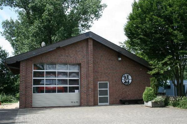 Feuerwehrgerätehaus in Wegberg-Moorshoven